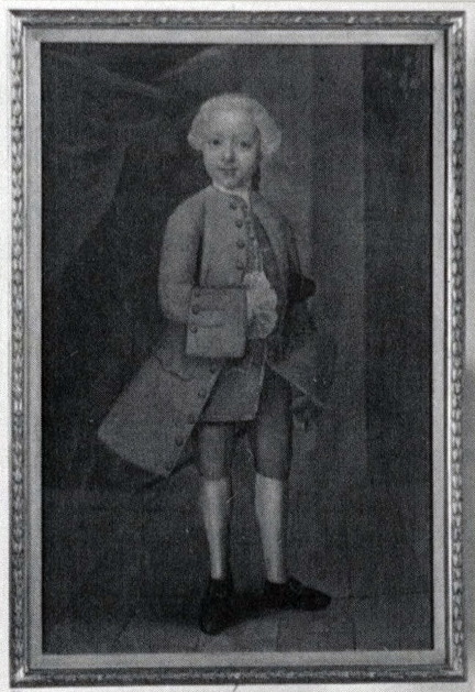 Kinderportret van Jan Hubert van Slijpe (1732-1791) of zijn zoon Jan Godart Cornelis van Slijpe (1757-1838). Verblijfplaats onbekend.